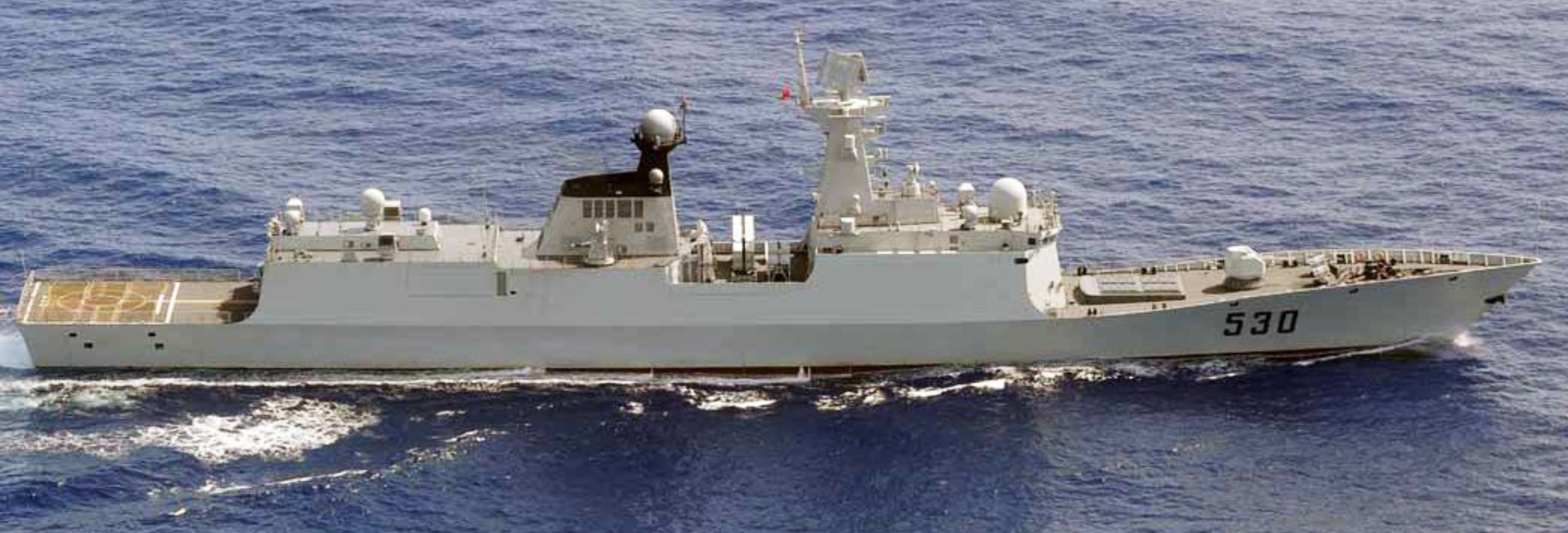 ５月１４日（月）午後２３時頃から午後２４時頃にかけて、海上自衛隊第５航空群（那覇）所属「Ｐ－３Ｃ」、第６護衛隊「たかなみ」（横須賀）及び第１５護衛隊「はまぎり」（大湊）が、宮古島の北東約１１０ｋｍの海域を太平洋から東シナ海に向けて北西進する中国海軍ジャンカイⅡ級フリゲート２隻及びドンディアオ級情報収集艦１隻を確認した。 なお、これら３隻の艦艇は、４月２９日（日）正午頃、屋久島の西約４３０ｋｍの海域を東シナ海から太平洋に向けて東進し、その後、沖ノ鳥島東約７００ｋｍの海域において無人航空機の飛行訓練を行っていたことが確認されている。